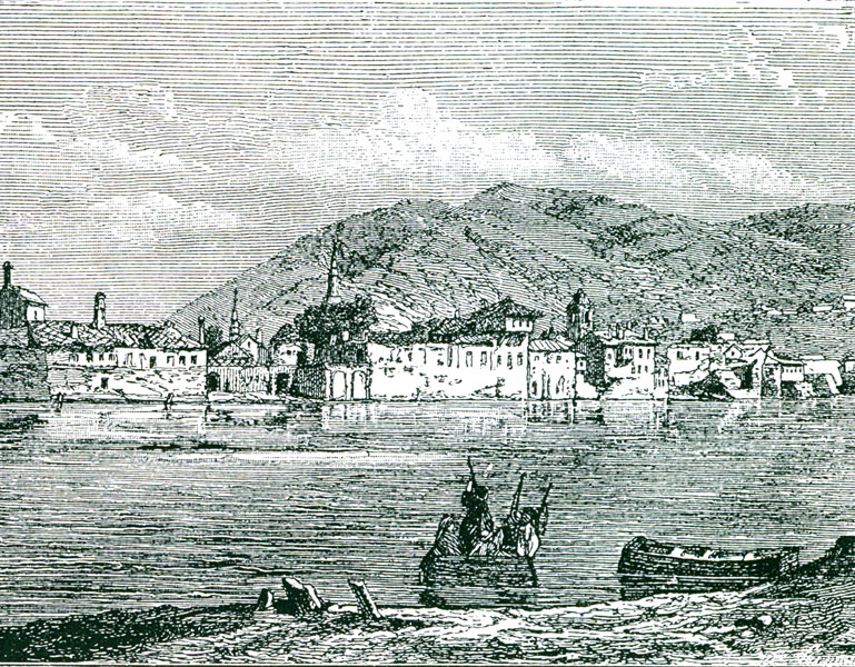 Требинье